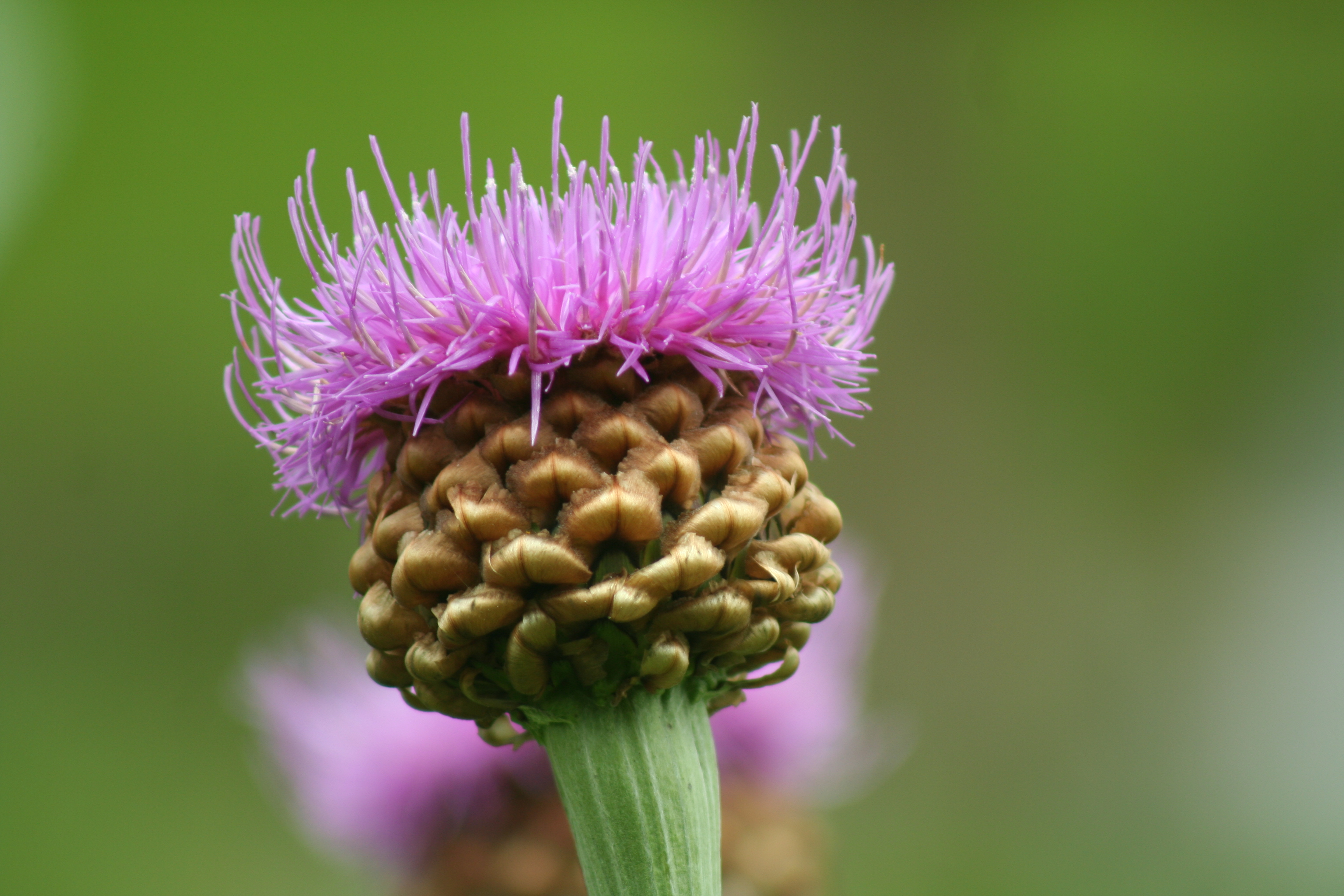 Località: "Giardino Botanico delle Alpi Orientali", Monte Faverghera (BL), 1500 m s.l.m.